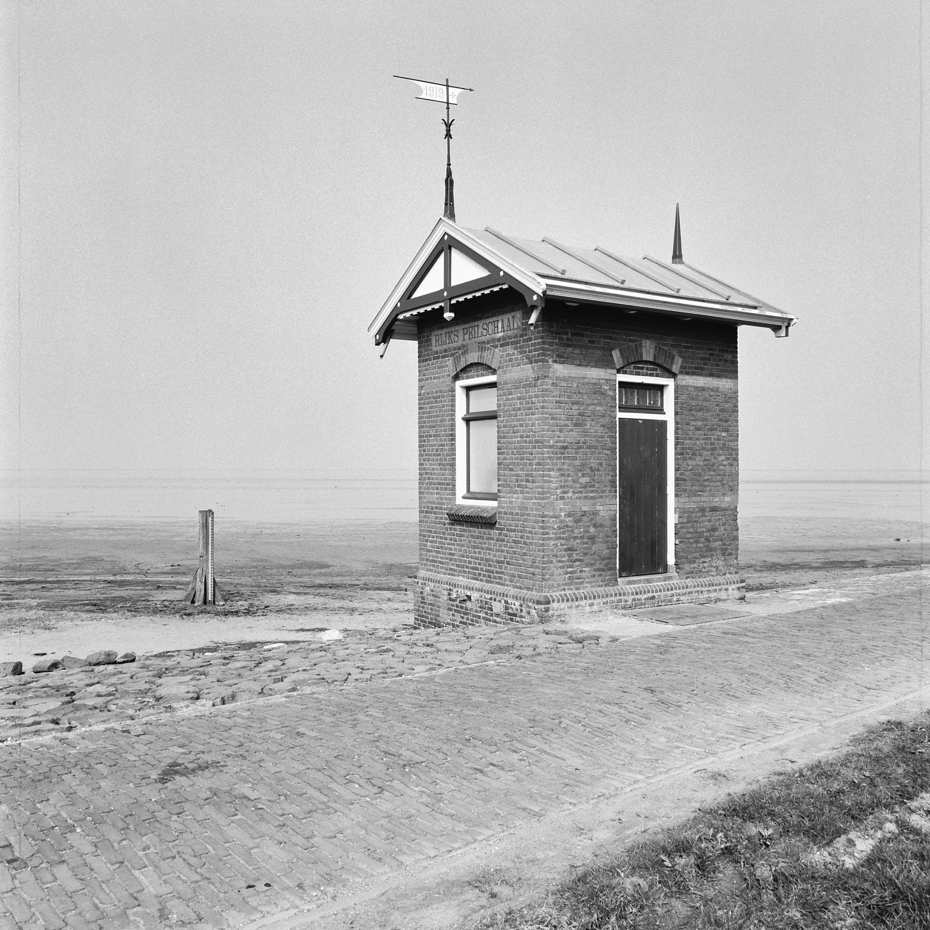 PEILSCHAALGEBOUW: Exterieur OVERZICHT (opmerking: Gefotografeerd voor MIP Noord-Holland)